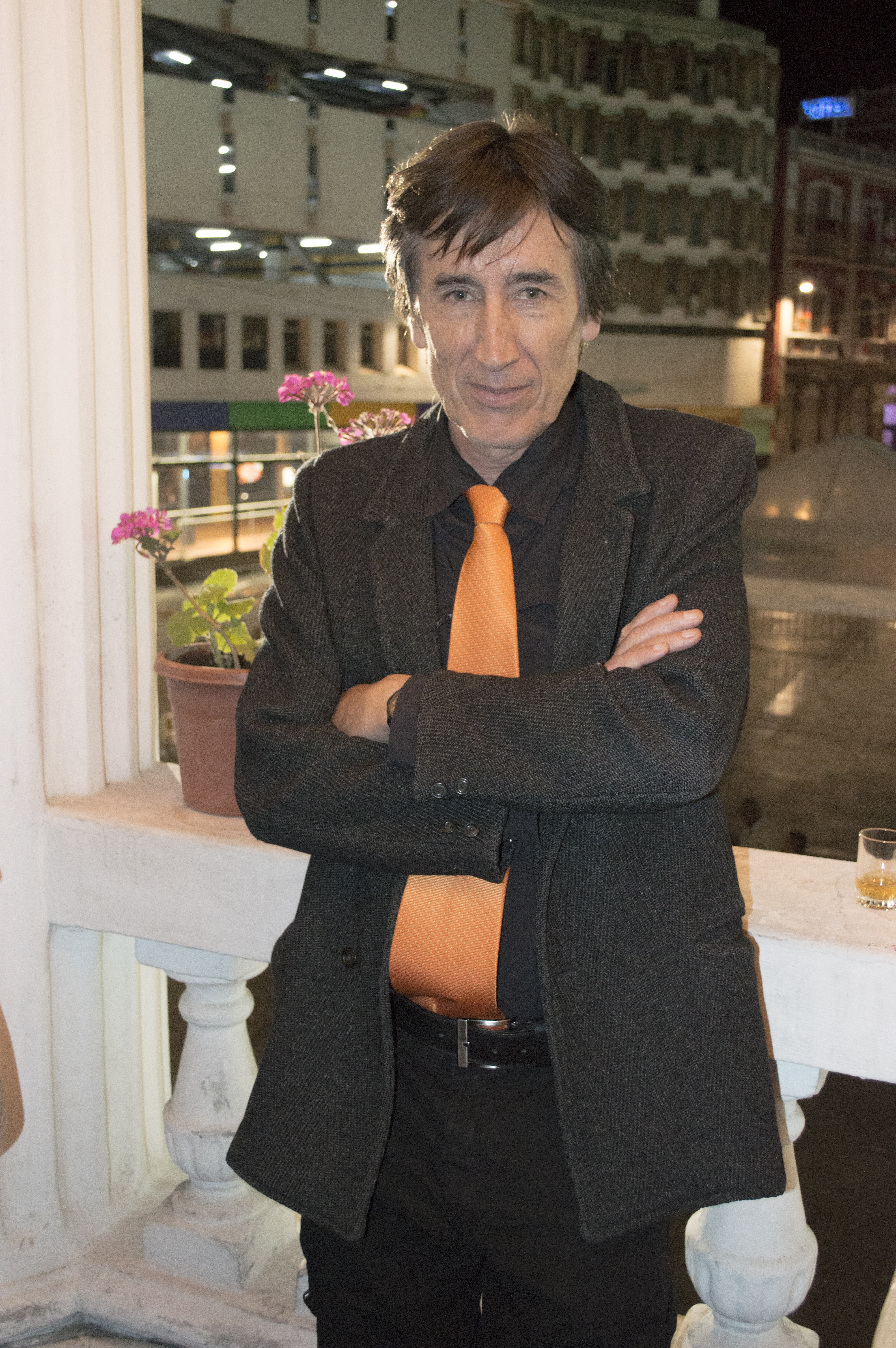 Camilo Luzuriaga luego de los Premios Colibrí el 11 de abril de 2015.